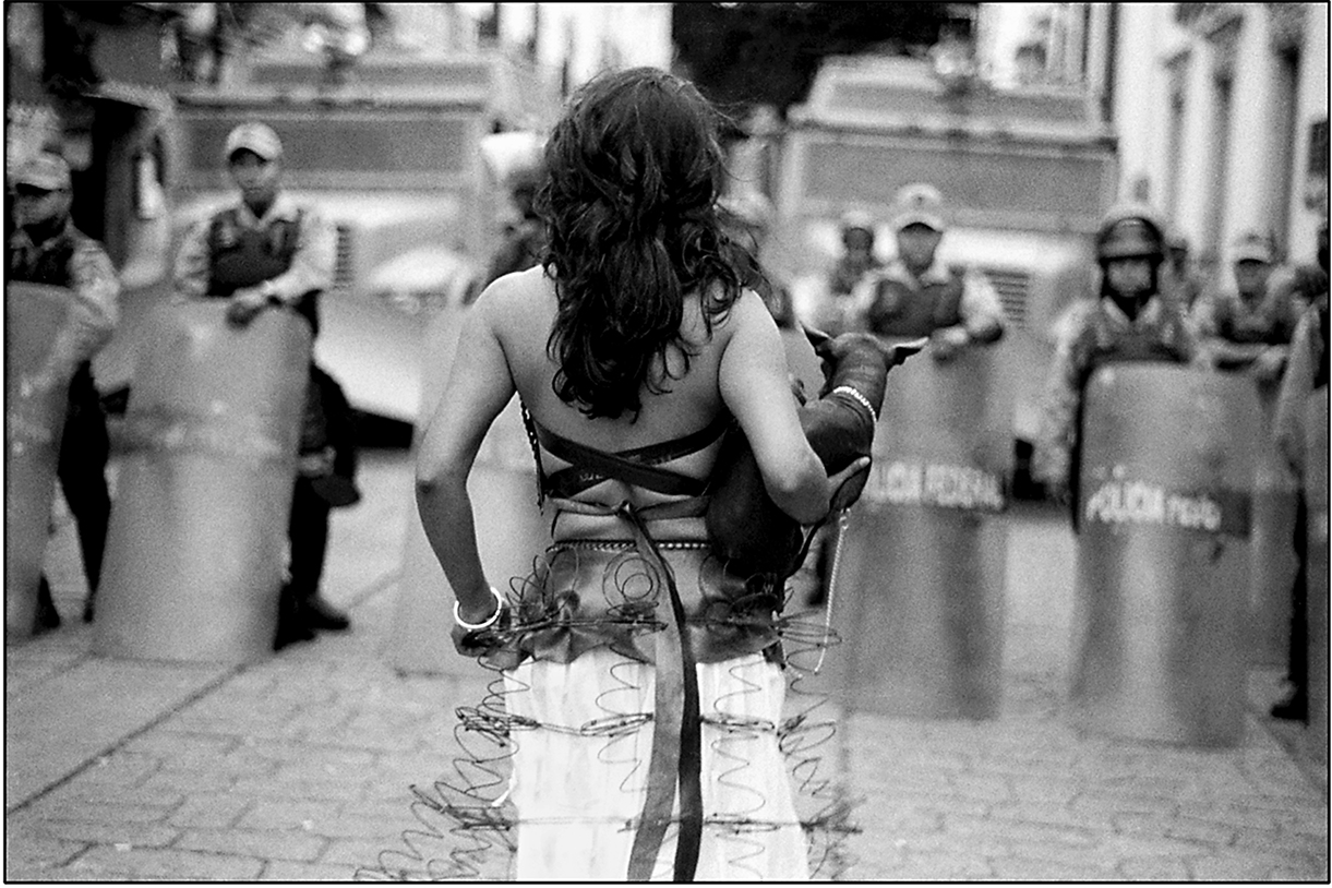 Performance de Gabriela León, Paseo Dominical por el Zócalo de Oaxaca, 2006.